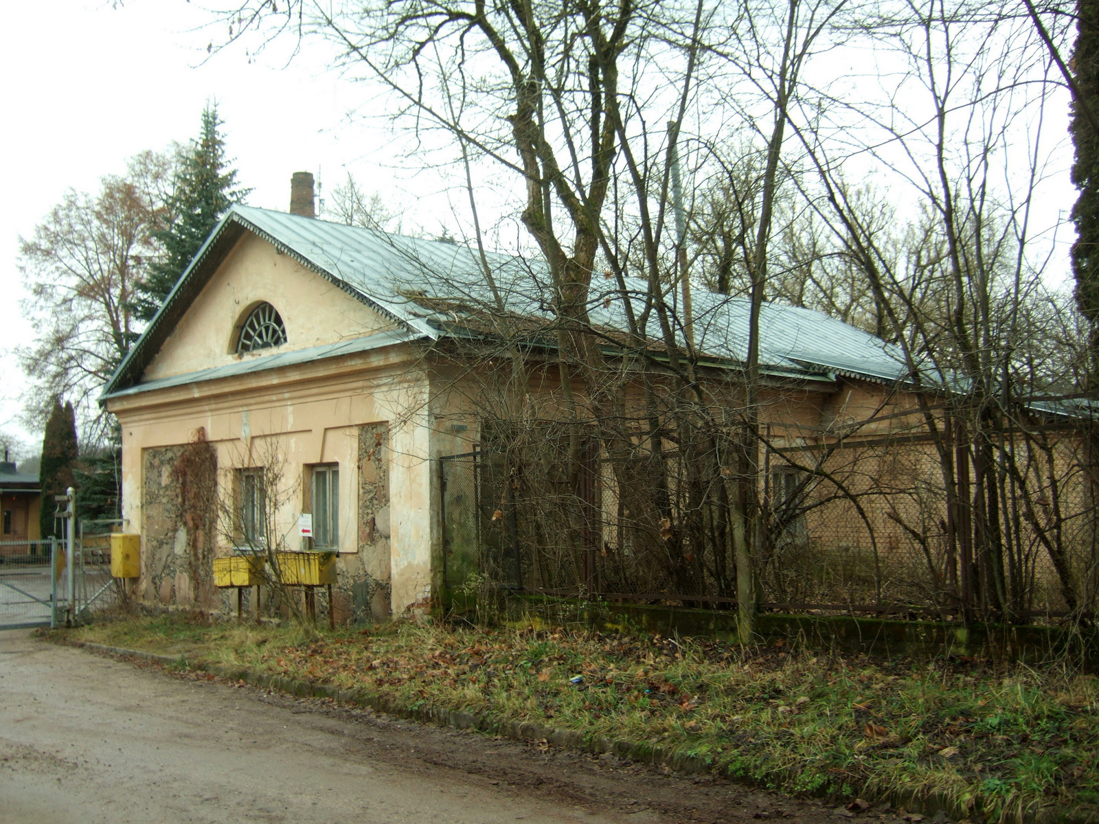 Kučkuriškių popieriaus fabriko buv. kontora